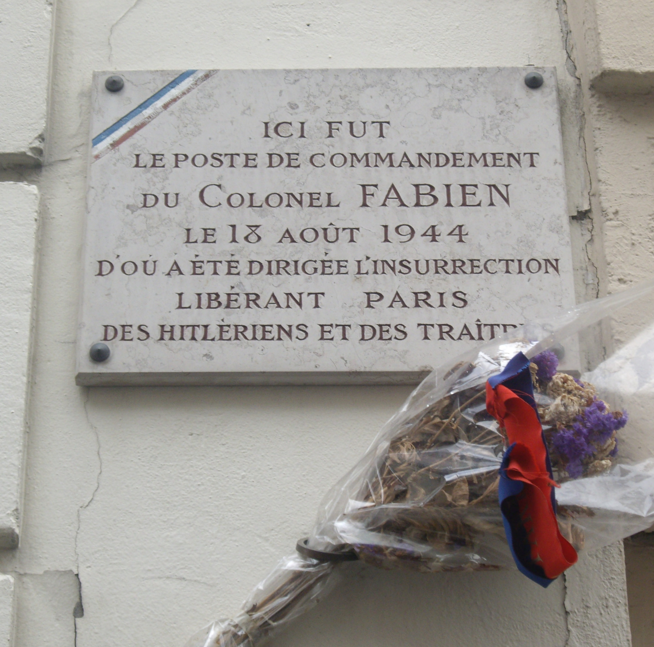 Plaque apposée au n° 34 de la rue Gandon, Paris 13e. « Ici fut le poste de comandement du Colonel Fabien le 18 août 1944 d'où a été dirigée l'insurrection libérant Paris des hitlériens et des traîtres. »